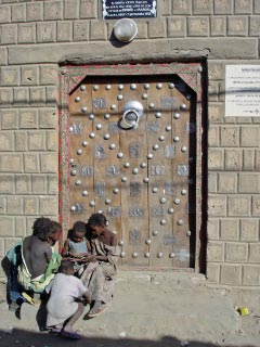 Timbuktu Caille House Street Scene. The plaque over the door (only partially visible here) reads: Souvenir Colonial Français A René Caillié 1799-1838 Il habita cette maison en Avril Mai 1828 lors de son voyage de Guinée au Maroc 9 Avril 1827 - 7 Septembre 1828